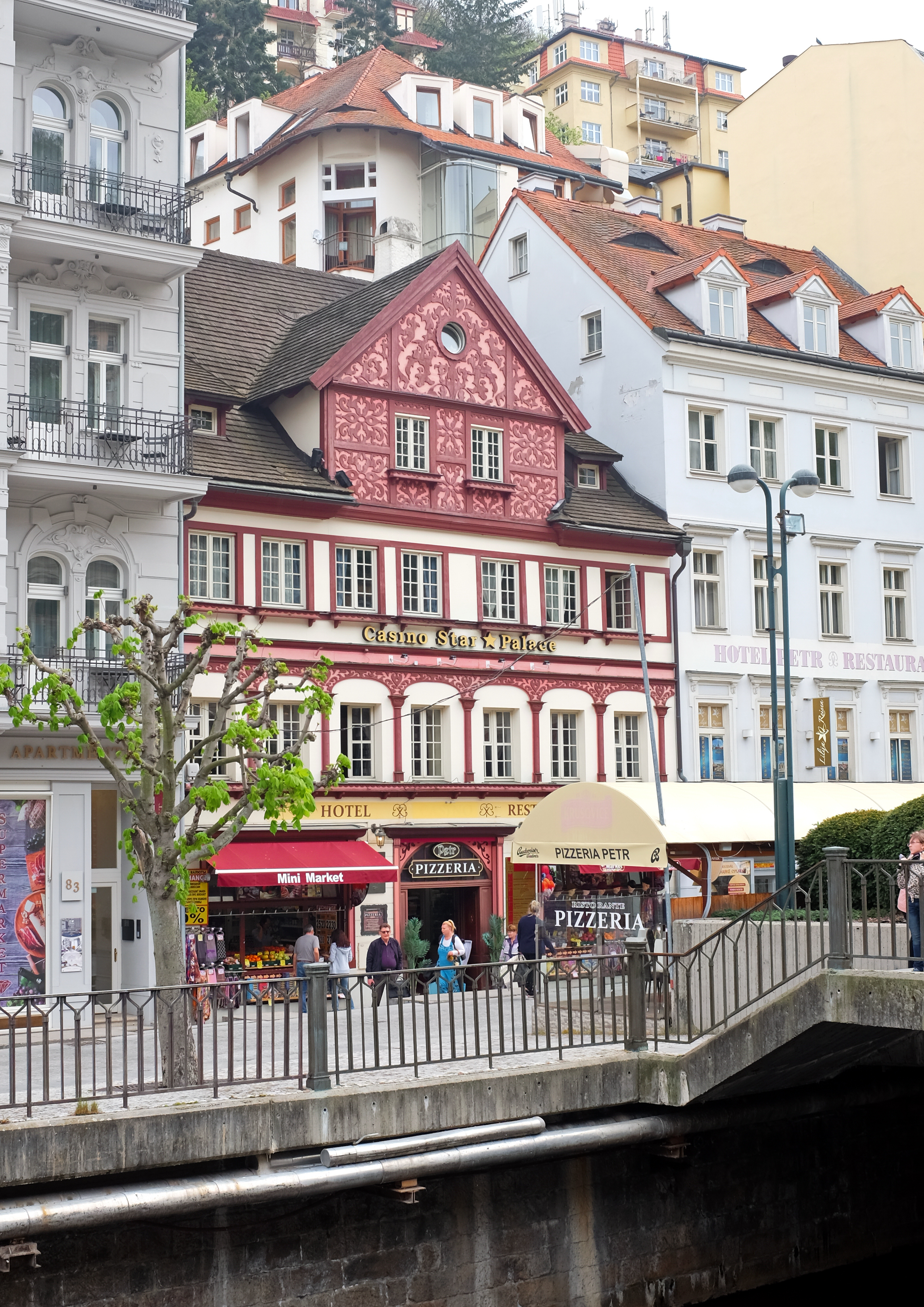 Lázeňský dům Petr, Vřídelní 85/13, Karlovy Vary.